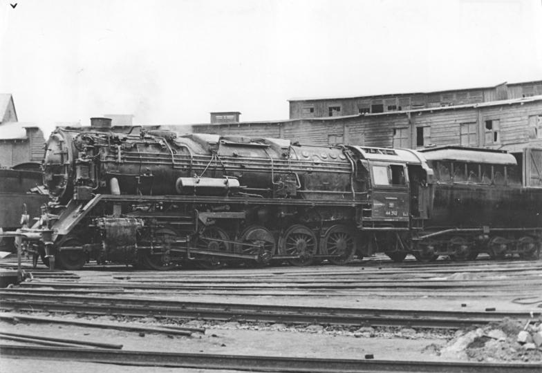 Dampflok 44 392 (BR 44) Zentralbild Schmidtke 7.8.1952 Lokomotivtypen der Deutschen Reichsbahn. UBz: Baureihe 44 Information added by Wikimedia users.